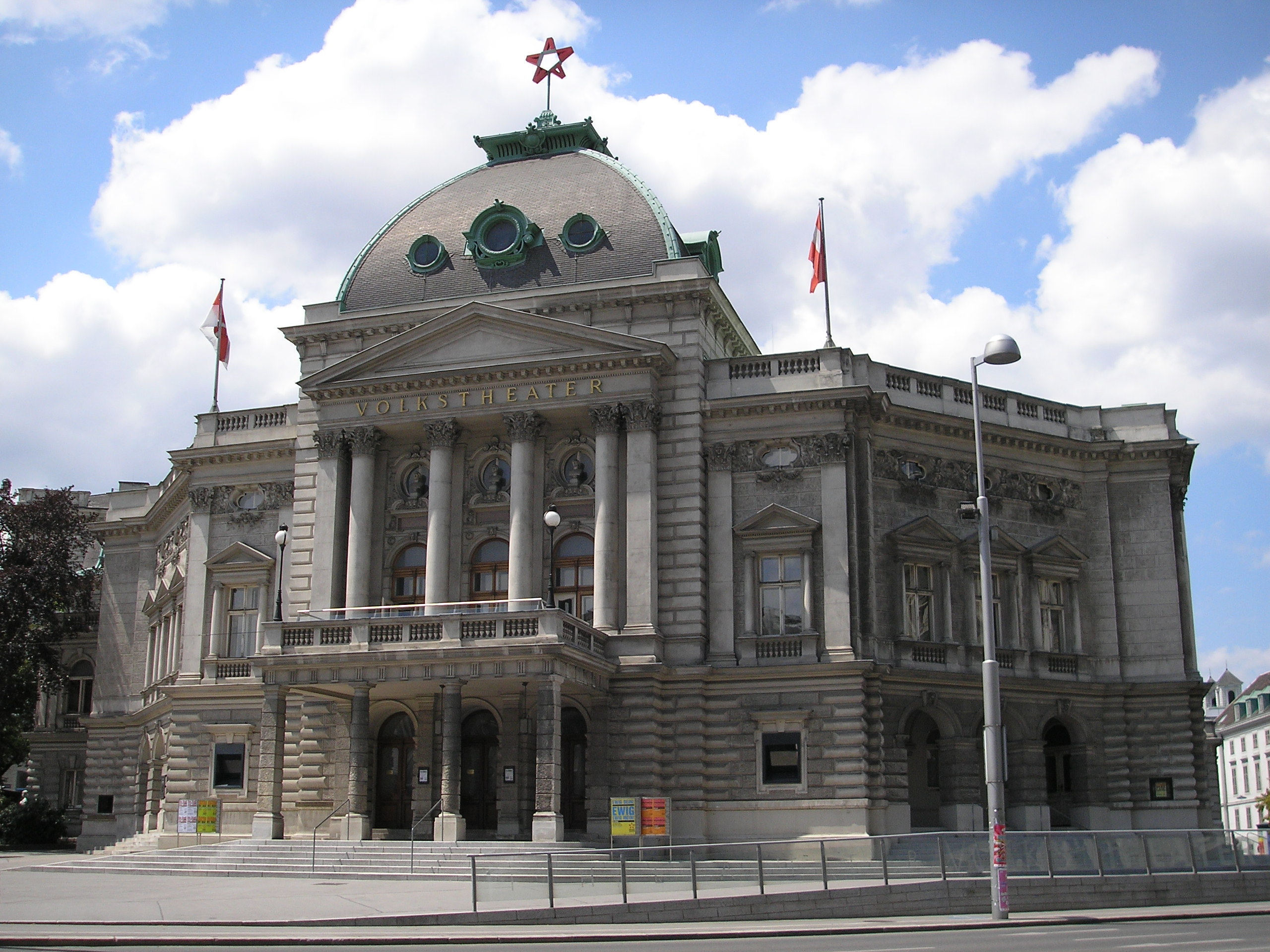 Volkstheater in Vienna.